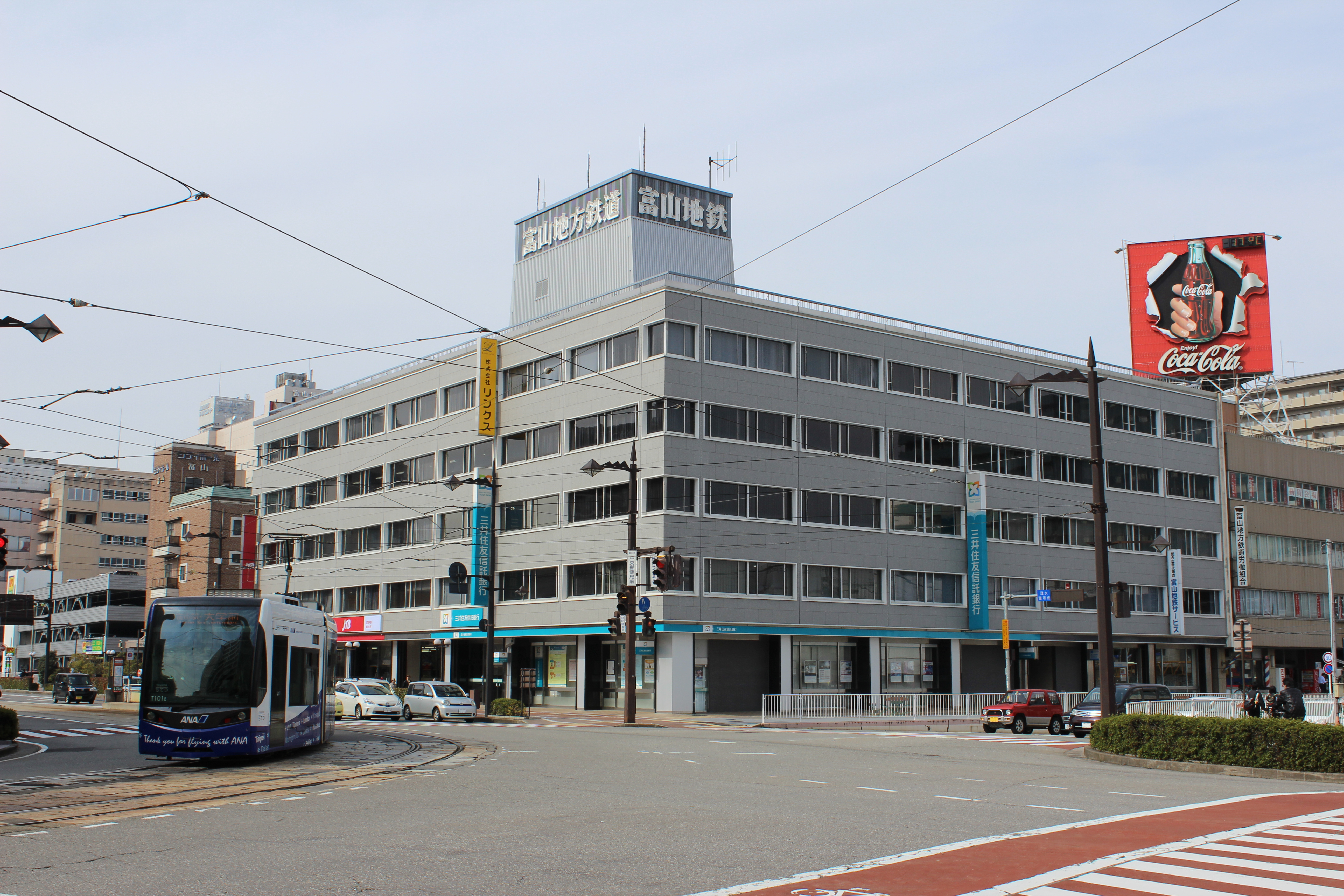 富山地鉄ビルと路面電車 富山県富山市桜町1丁目1−36（ナンバープレートレタッチ）